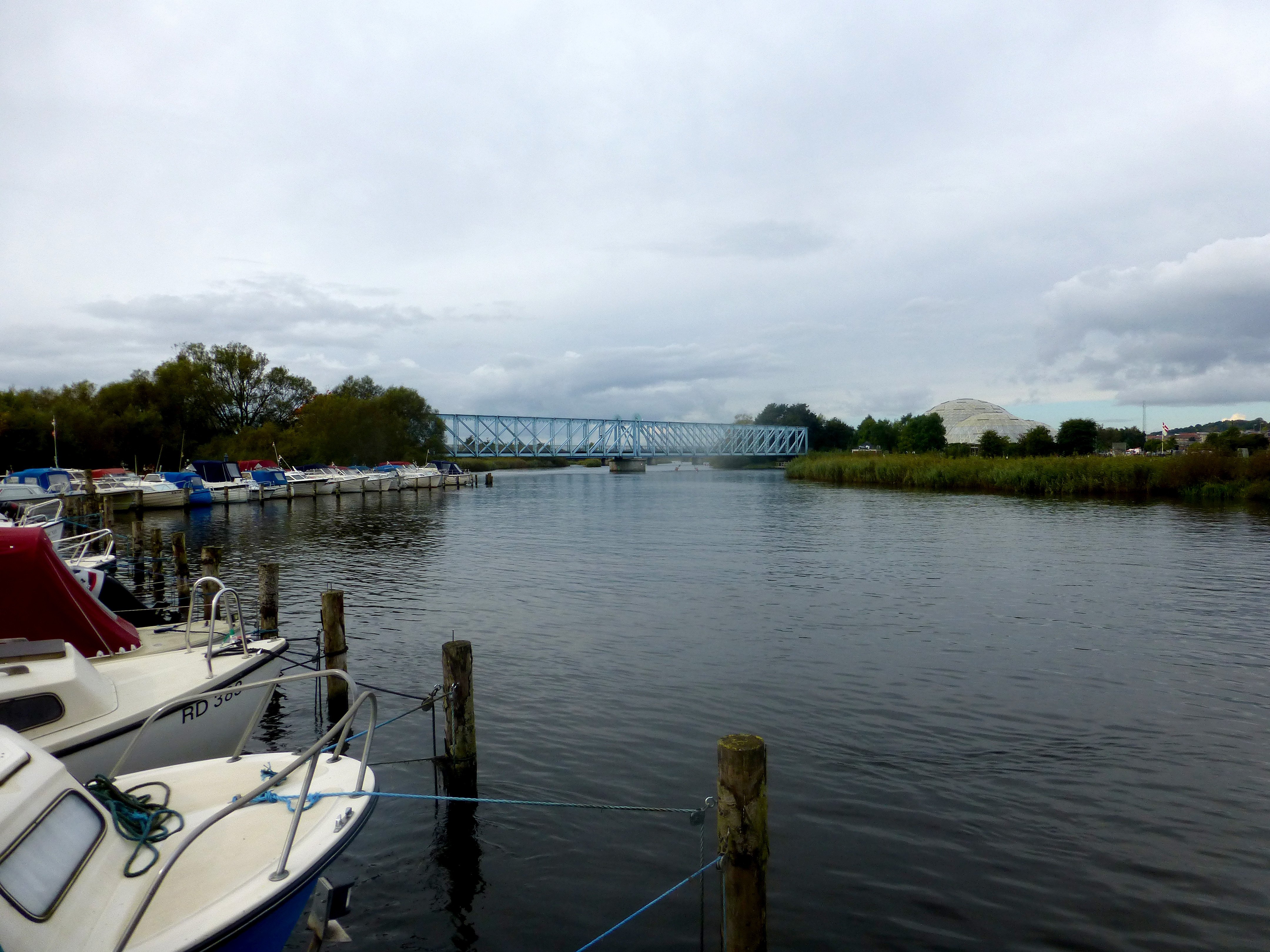 Gudenåen ved Randers set mod vest, fra sydbredden med den gamle jernbanebro i baggrunden.